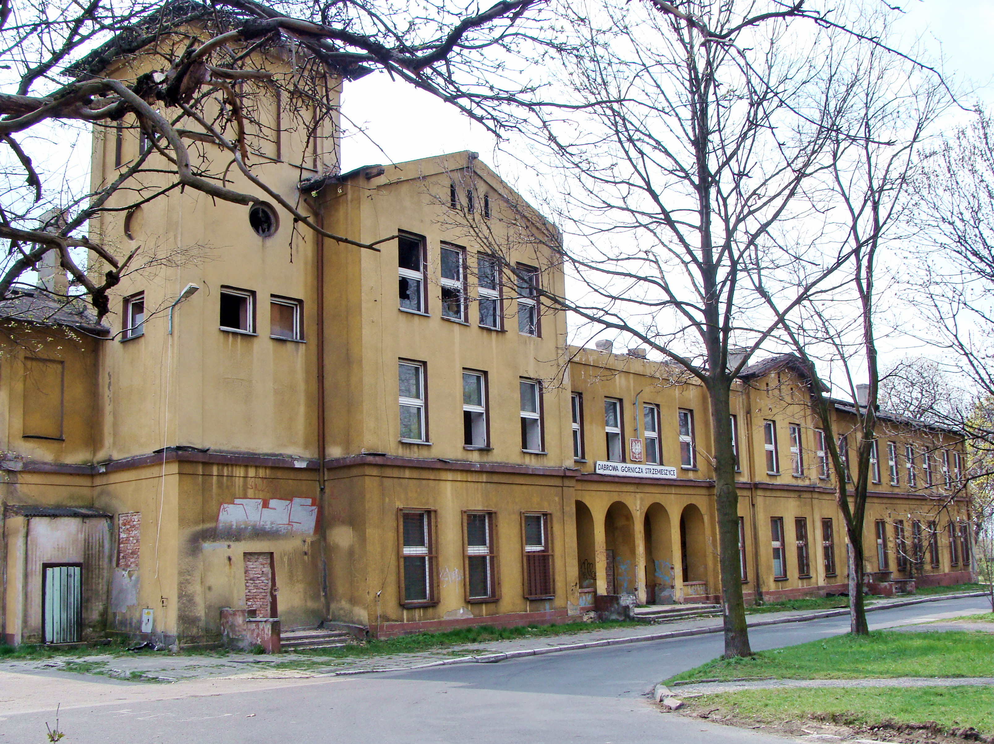 Dąbrowa Górnicza - Strzemieszyce Wielkie - Dworzec kolejowy (północny)